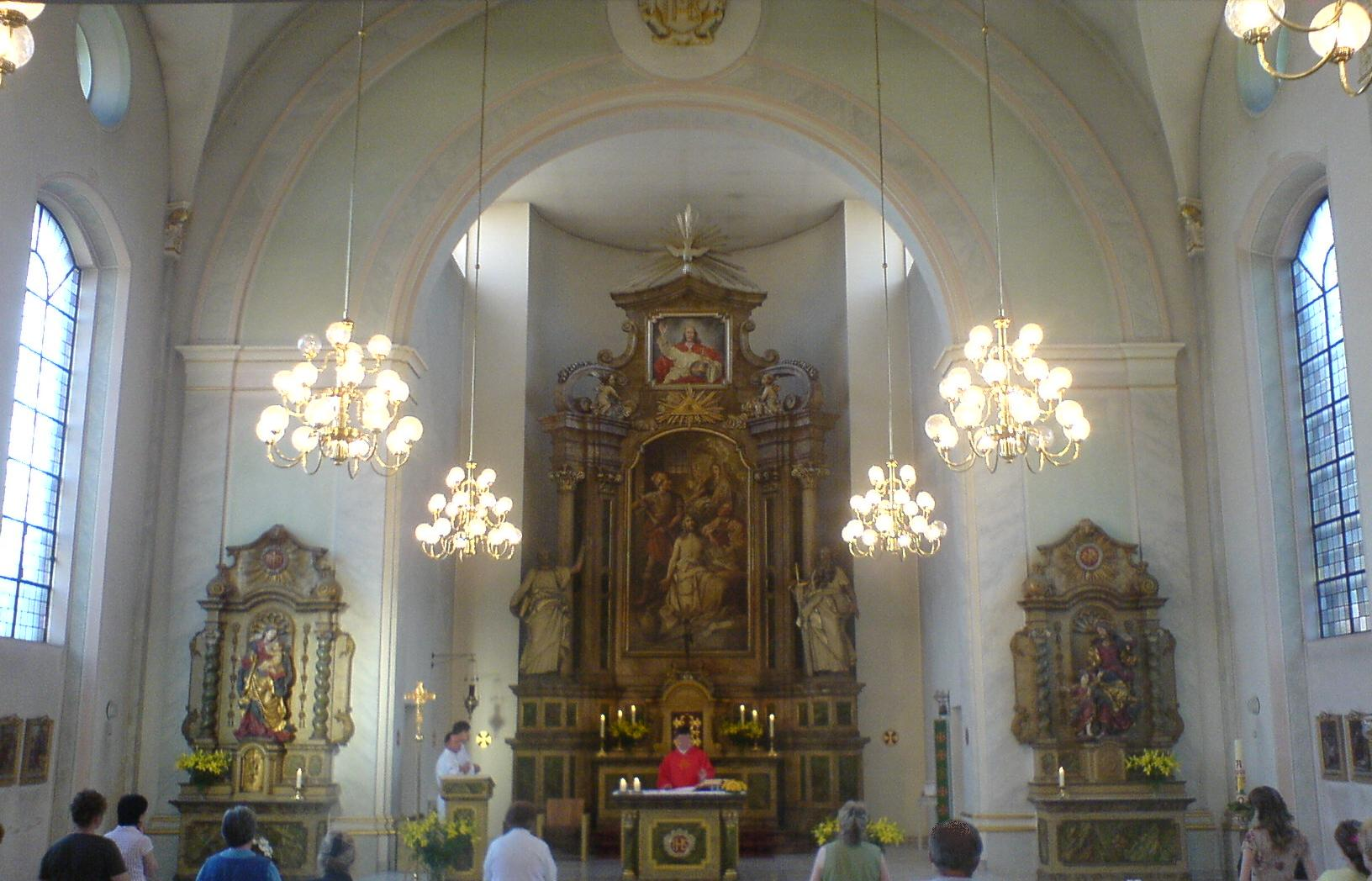 Bildbeschreibung: St. Joseph Freiheit Fotograf/Zeichner: PodracerHH 21:33, 3. Jul 2006 (CEST) Datum: 07.2006 Sonstiges: ...